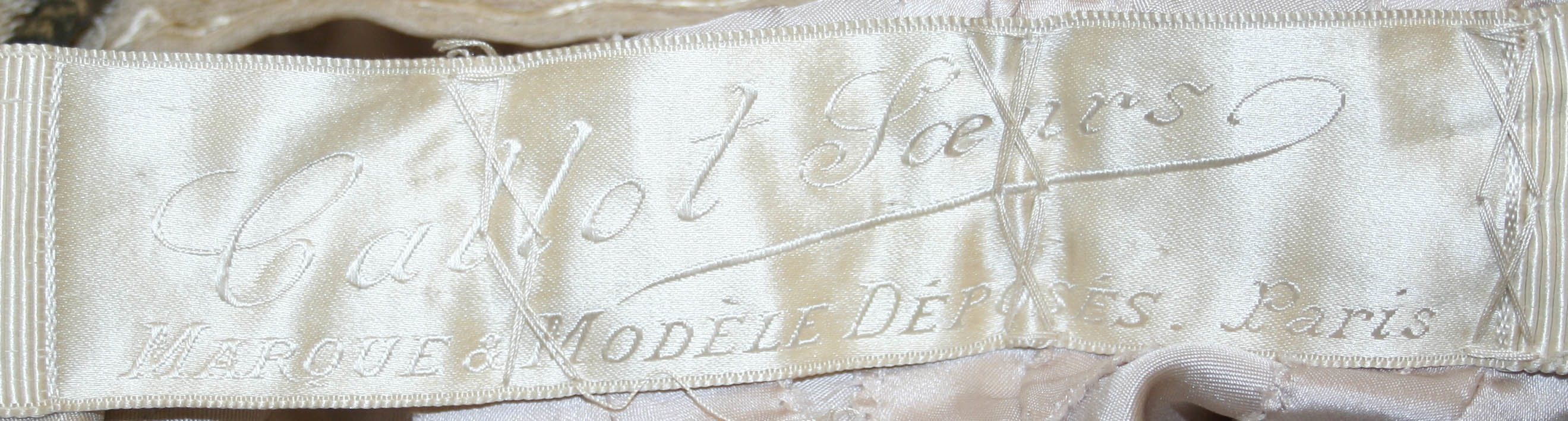 French; Evening dress